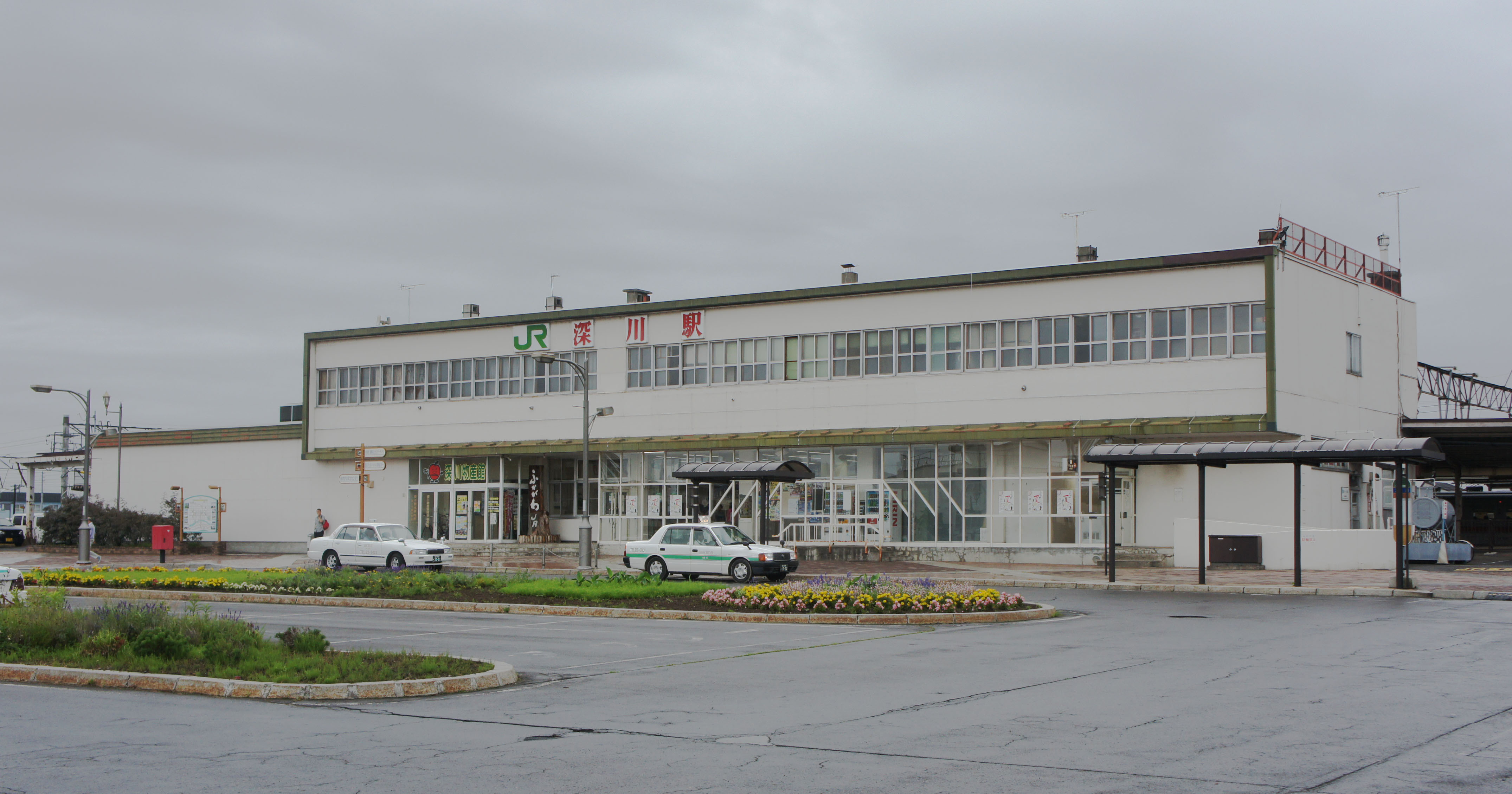 JR函館本線/留萌本線・深川駅の駅舎 Sony NEX-3